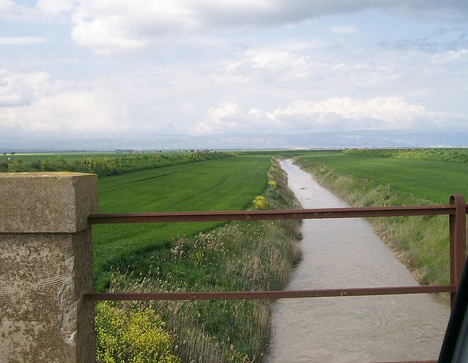 Zapponeta, Province of Foggia, Italy